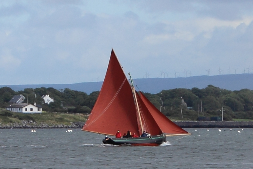 Galway Hooker a Kinvara en 2013